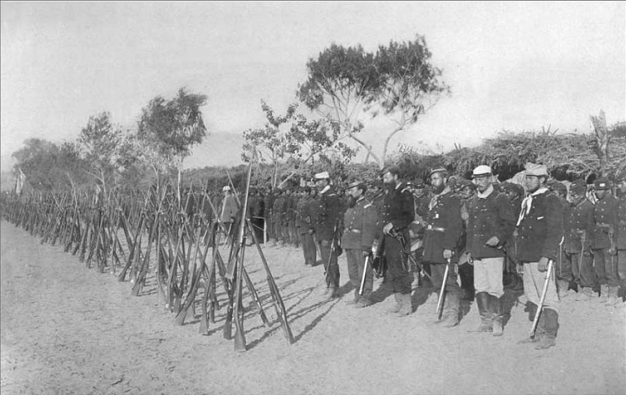 Regimiento Chileno cívico movilizado “Chillán” en el campamento de Lurín, Enero 1881. Destacan sus armas en pabellón, fusiles Franceses Gras modelo 1874. Llama la atención la diversidad de uniformes de la Oficialidad (Fotografía Díaz y Spencer, Archivo Museo Histórico y Militar, Chile).